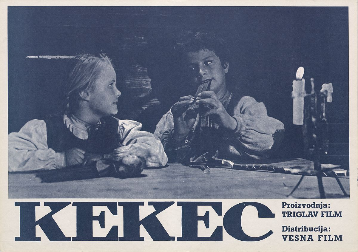 Plakat za film Kekec.